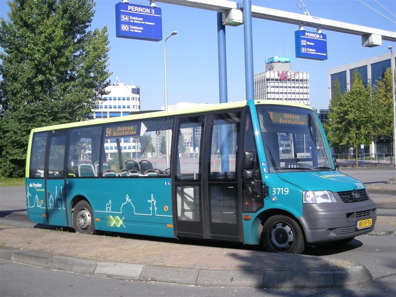 Frysker, bus.